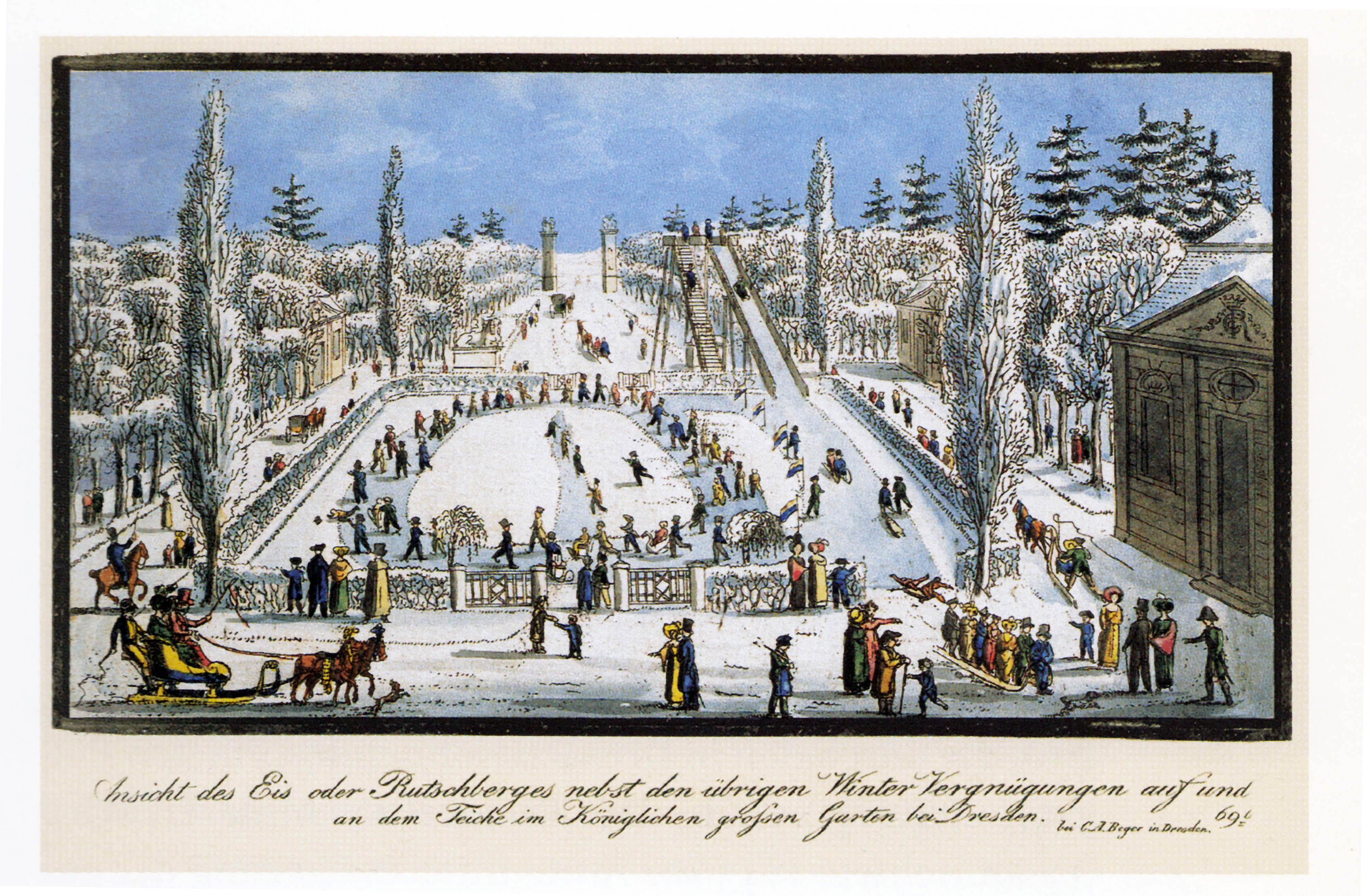 „Ansicht des Eis- oder Rutschberges nebst den übrigen Wintervergnügungen....“ colorierter Kupferstich, erste Hälfte des 19. Jahrhunderts.